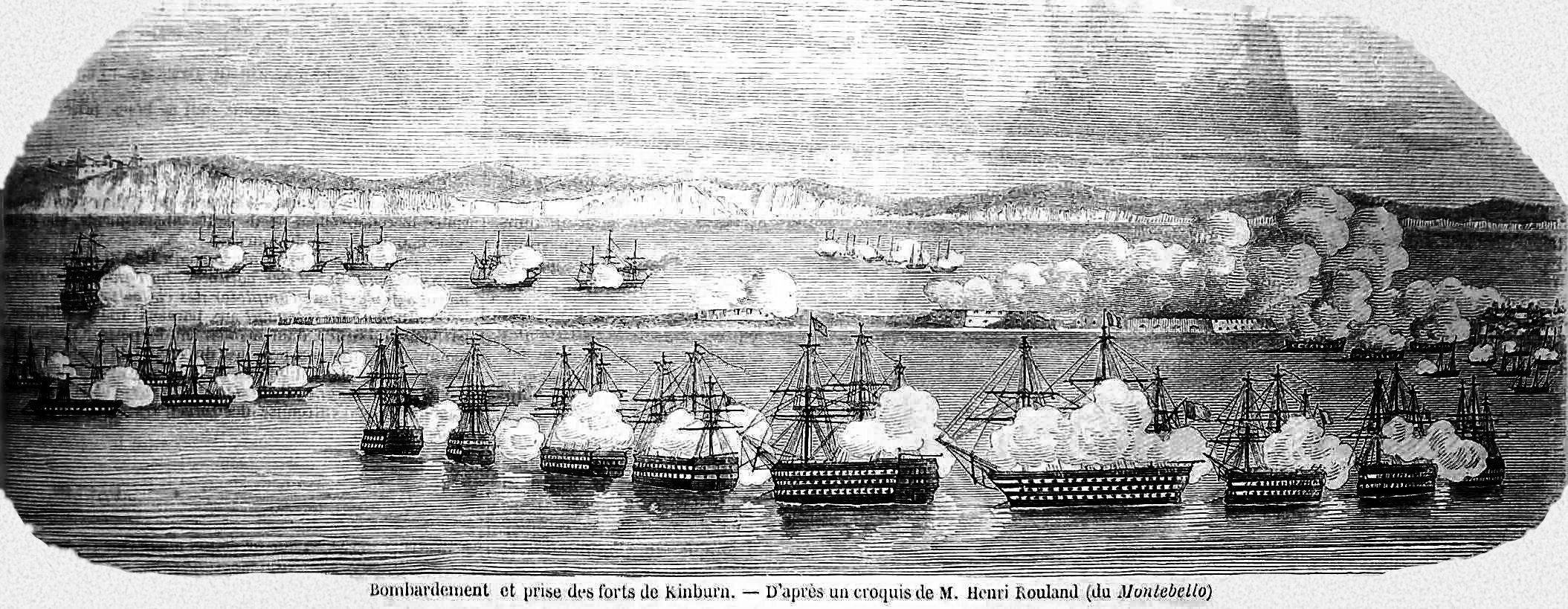 Bombardamento e presa del forte di Kinburn, incisione